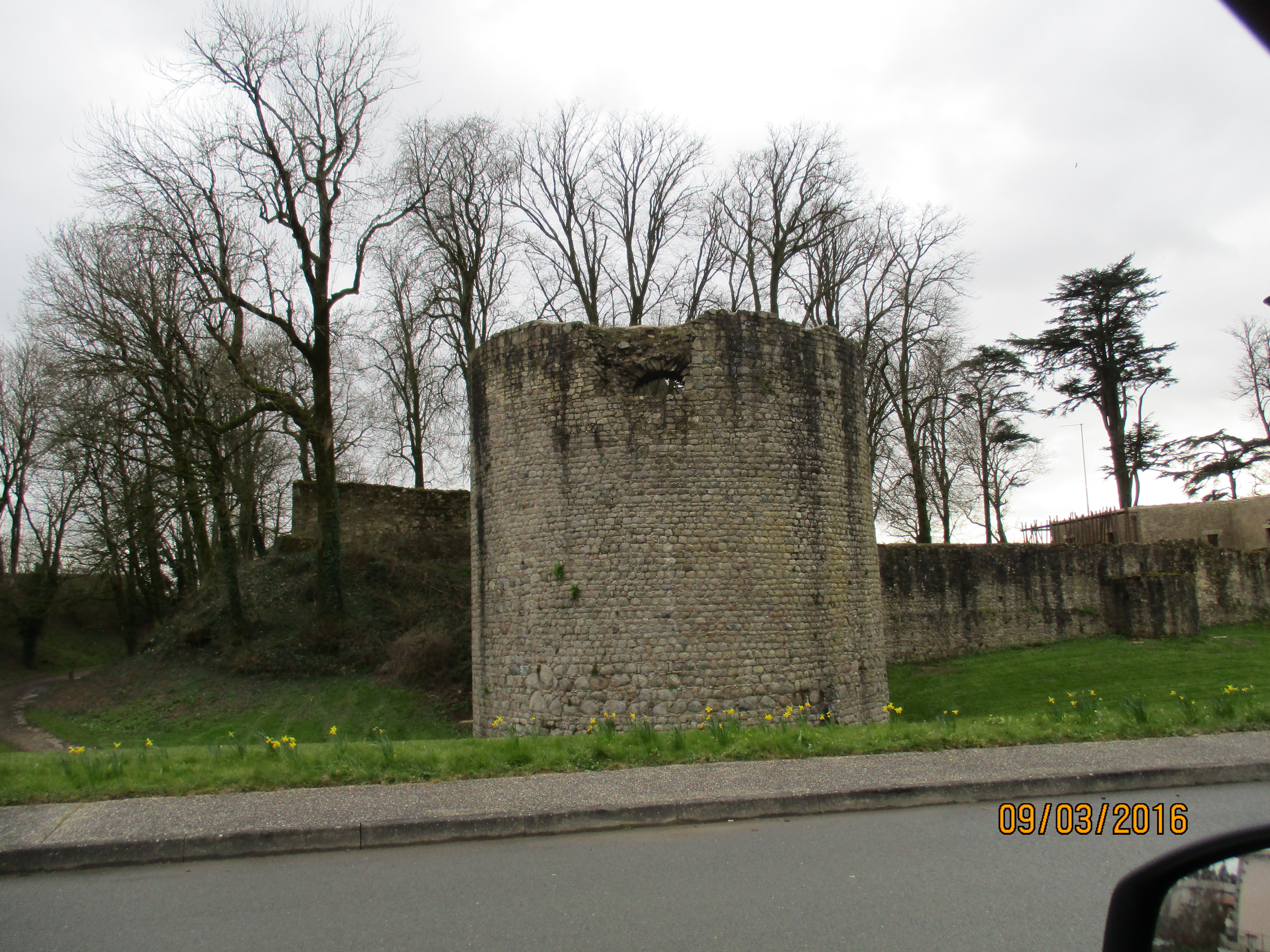 Photographie d'une des 12 tours du château fort de Pouzauges.